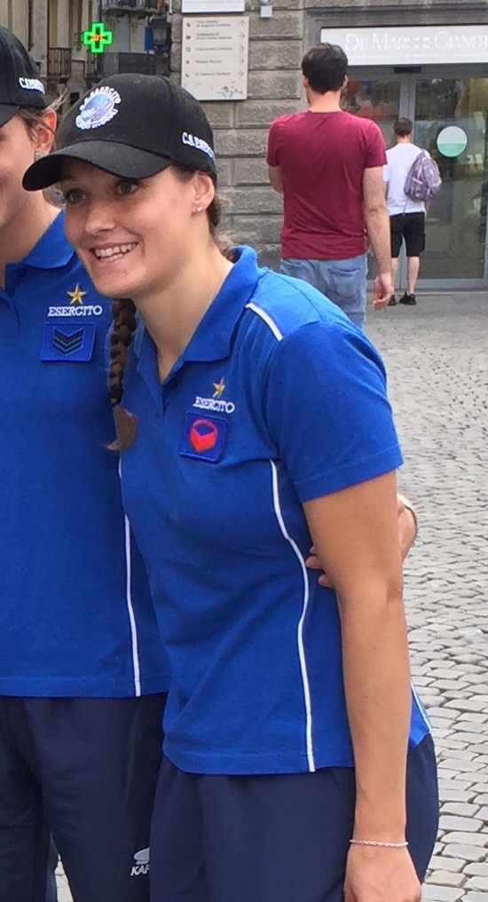 Federica Sosio, italian alpine skier